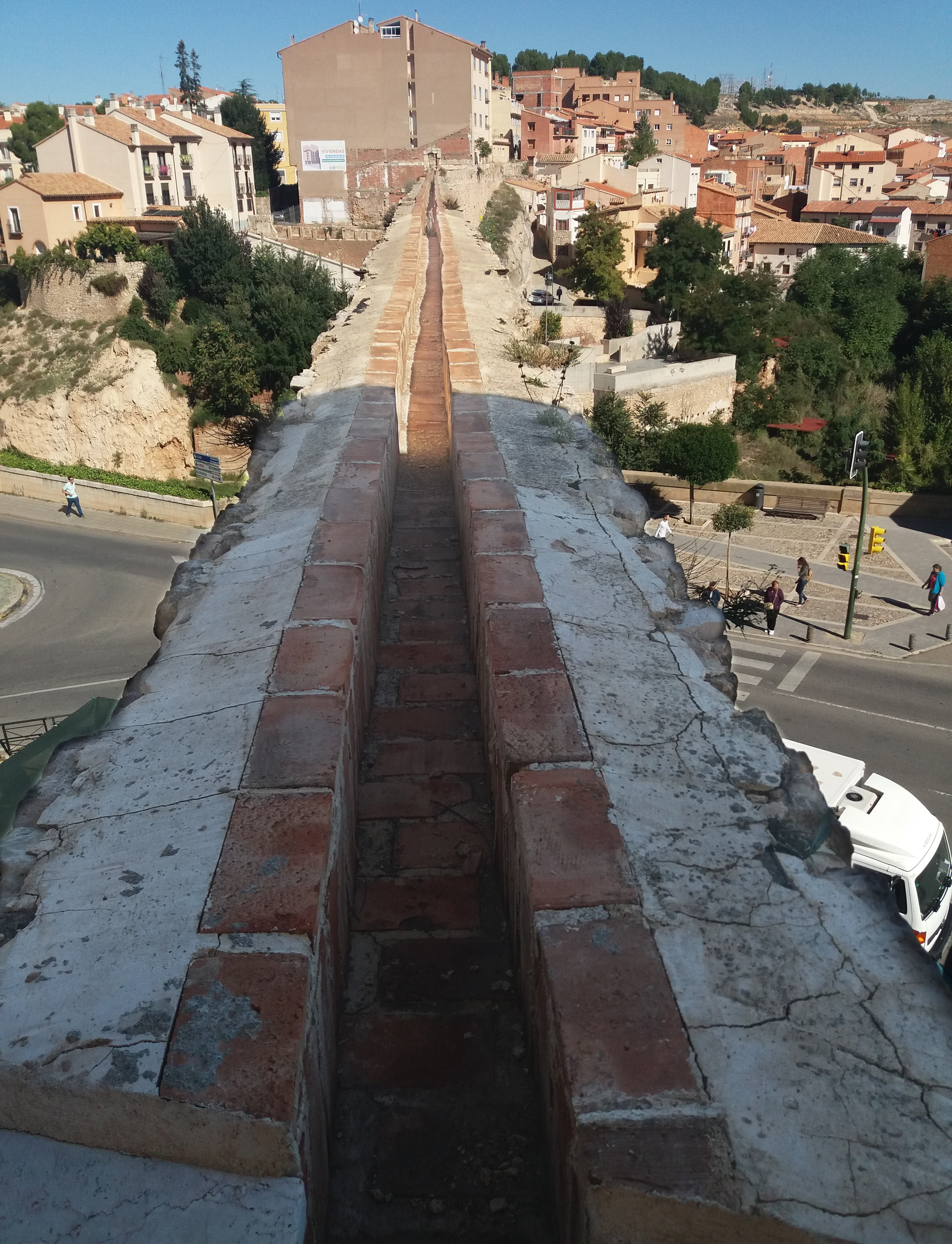 Acueducto-viaducto de Teruel 2018